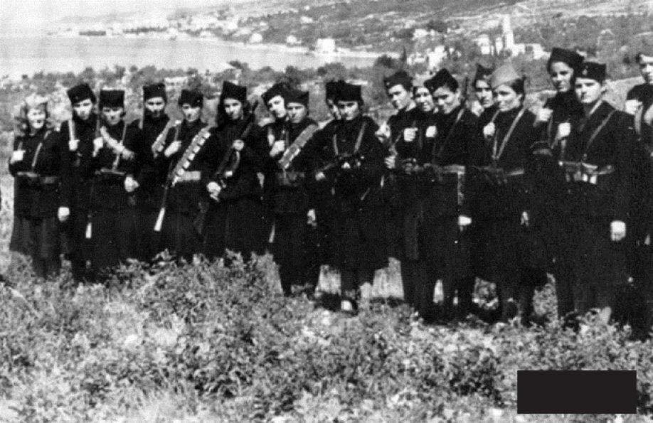 Српски (ћирилица): Припаднице организације Црне шамије, ЈВуО. 31.3.1944